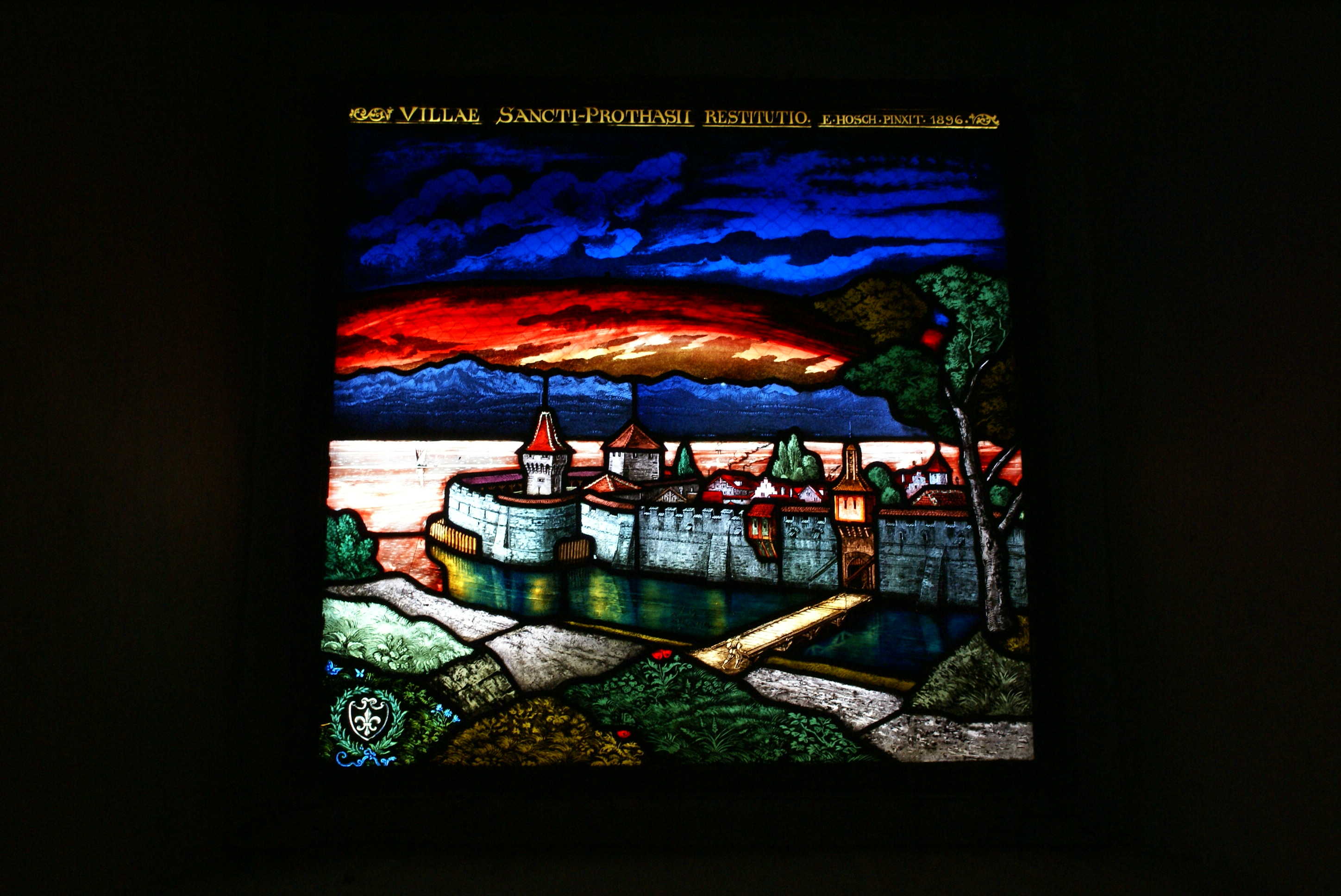 détail d'un des vitraux du temple de St-Prex (Suisse)